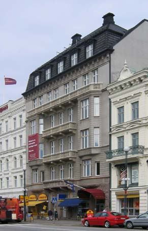 Bostads o butikshus vid Gustav Adolfs torg Malmö